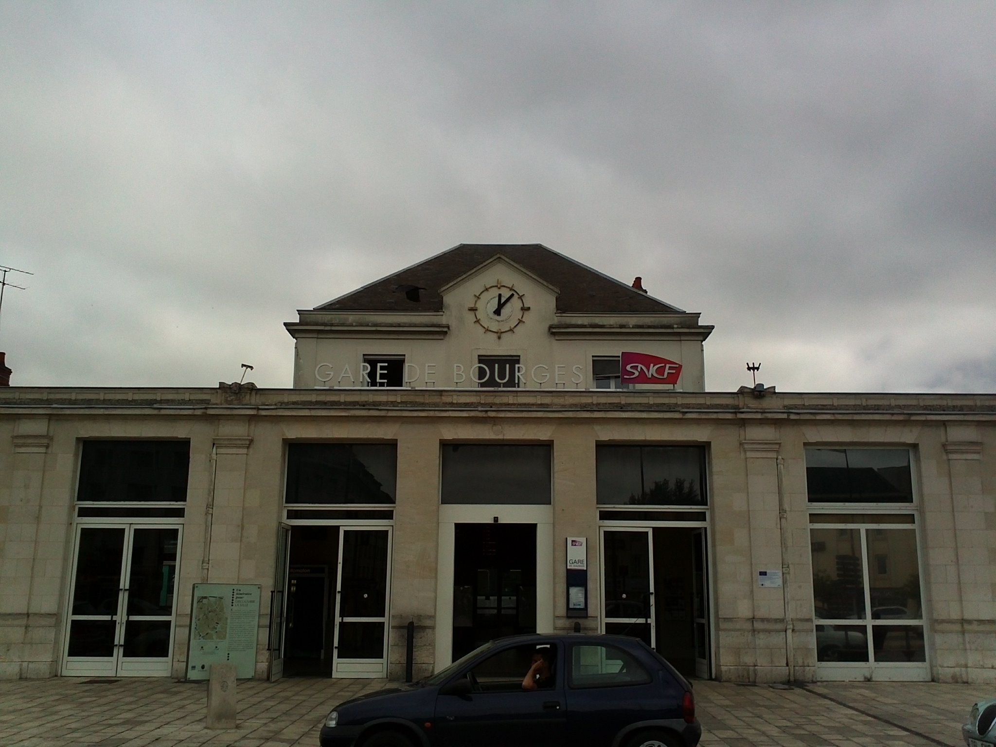 布尔日站（Gare de Bourges）